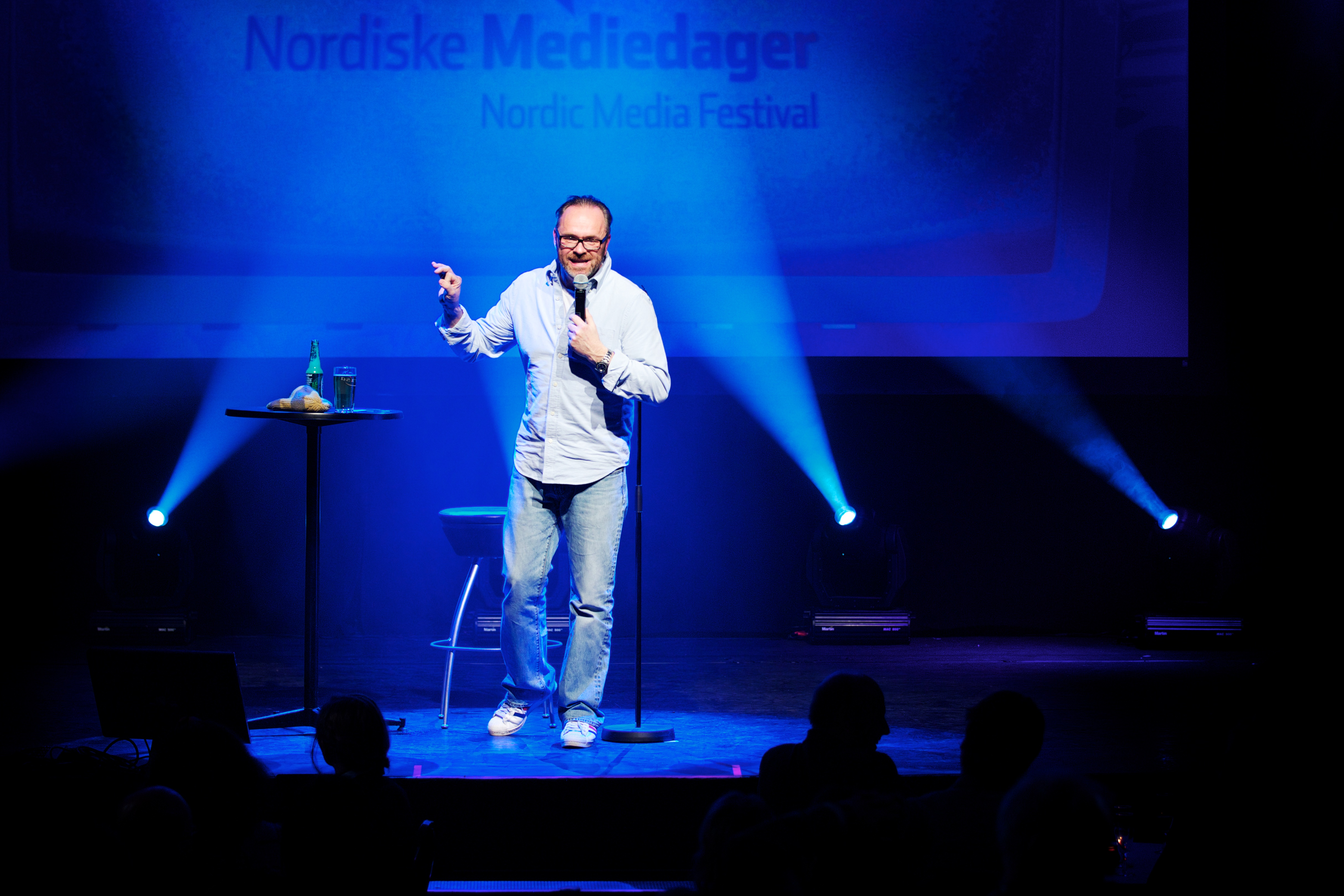 Arne Berggren under Nordiske Mediedager i 2010. Foto: Eirik Helland Urke